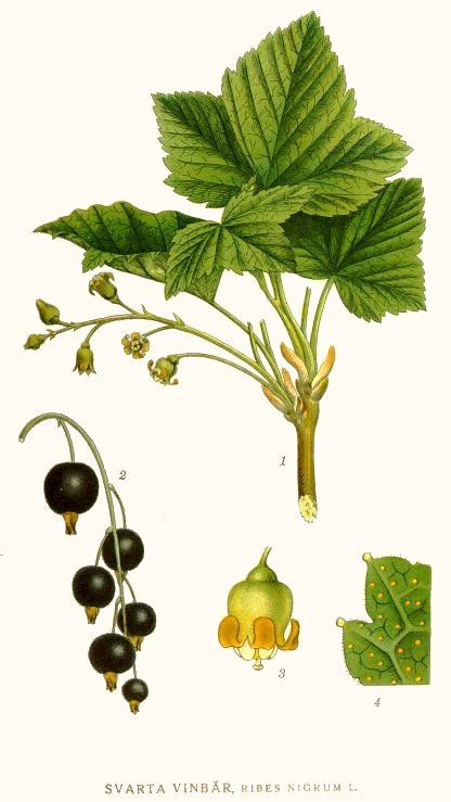 Original Description Svarta vinbär, Ribes nigrum L.